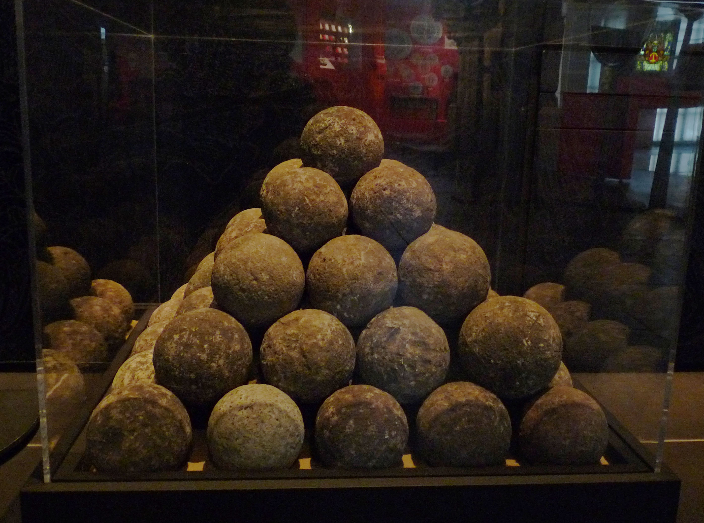 Importance de l'arsenal : boulets en pierre trouvés à Strasbourg (Musée historique de Strasbourg)